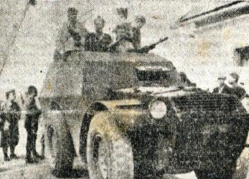 Partizani Šercerjeve brigade na Kočevskem